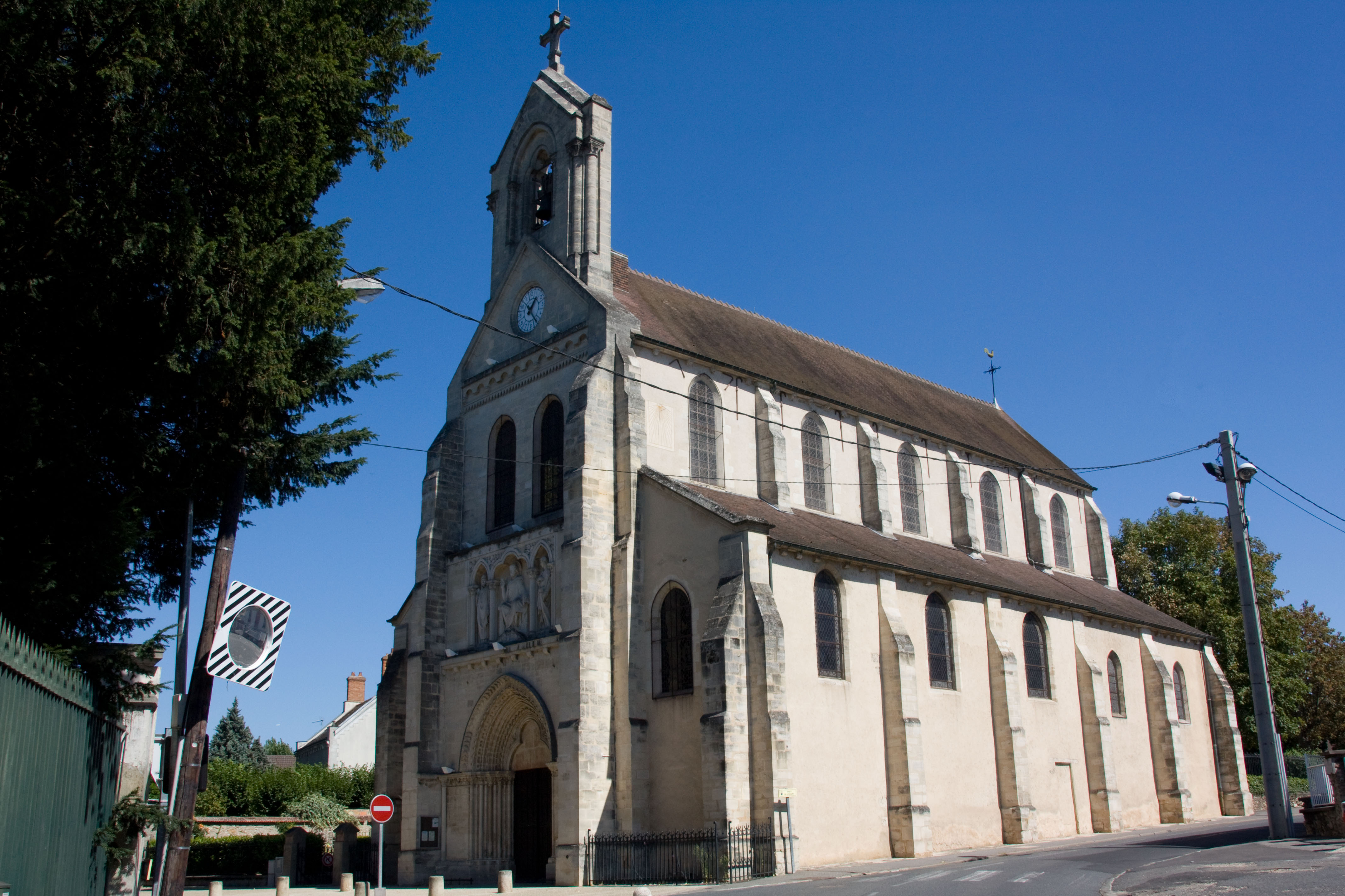 Eglise de Saint-Germain-lès-Corbeil, Saint-Germain-lès-Corbeil, Essonne, France